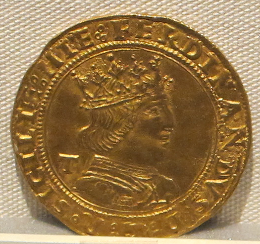 Palazzo Massimo alle Terme